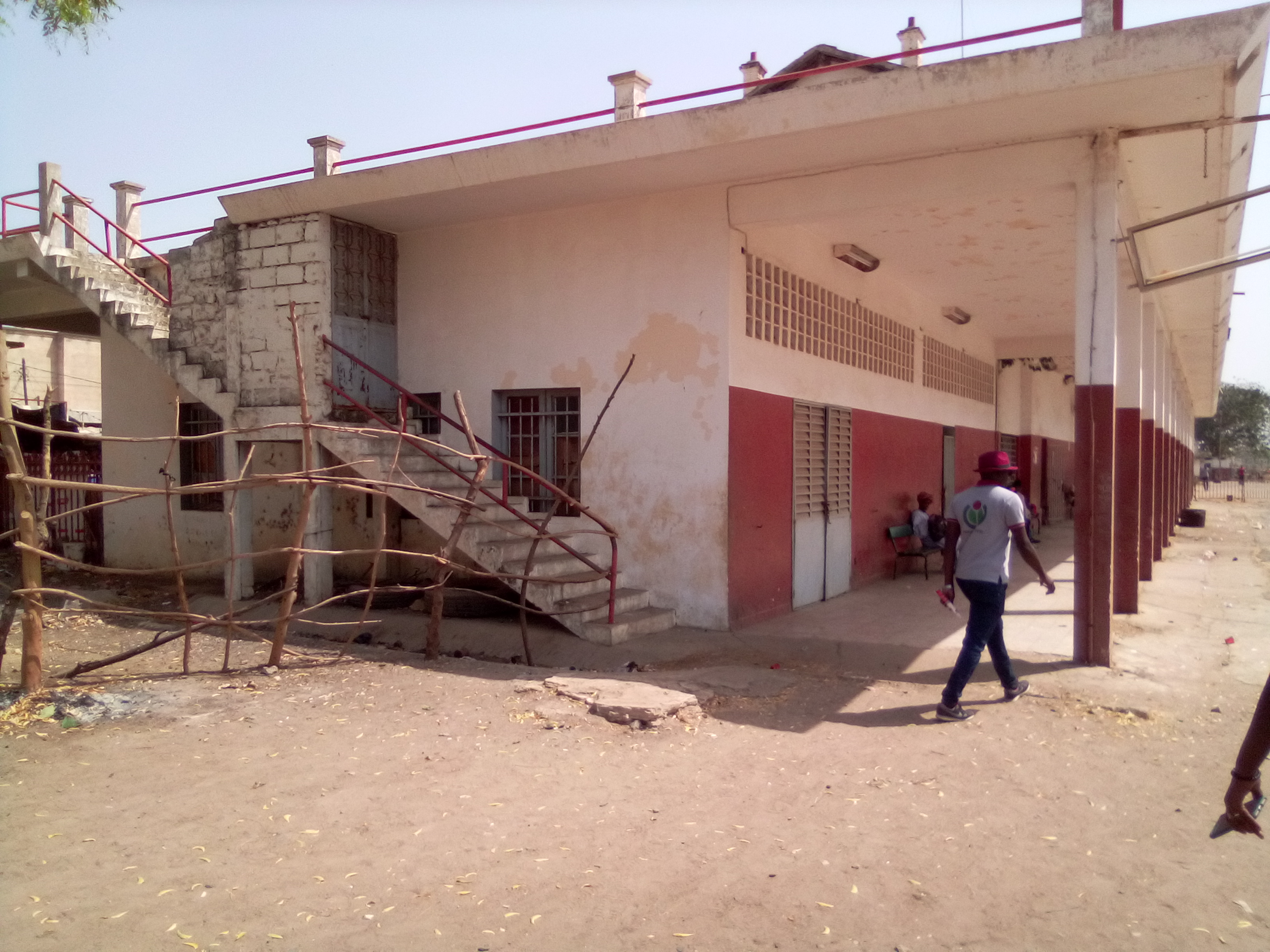 Les voyageurs se rendent à la gare pour se payer leurs billets et prennent départ pour différentes destinations This is an image with the theme "Africa on the Move or Transport" from: Senegal